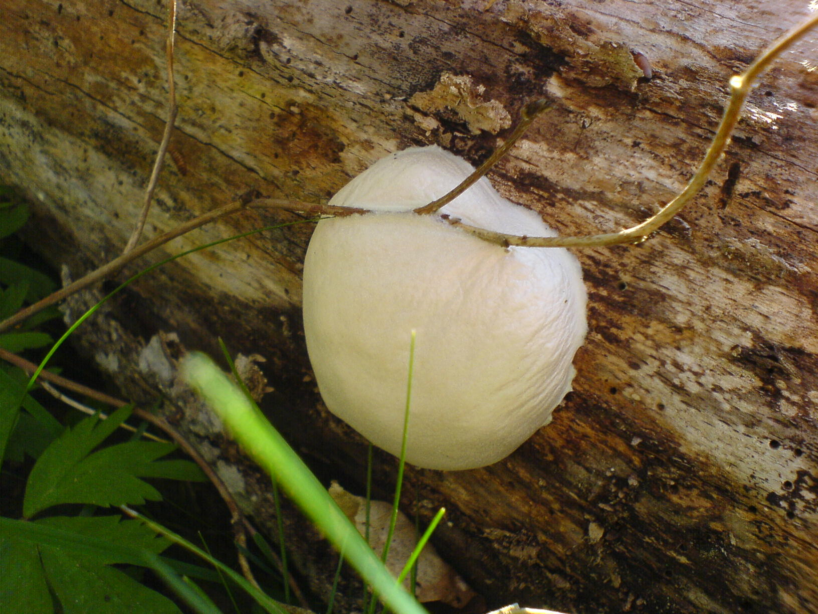 foto av ett exemplar av ett sotägg (en svamp)